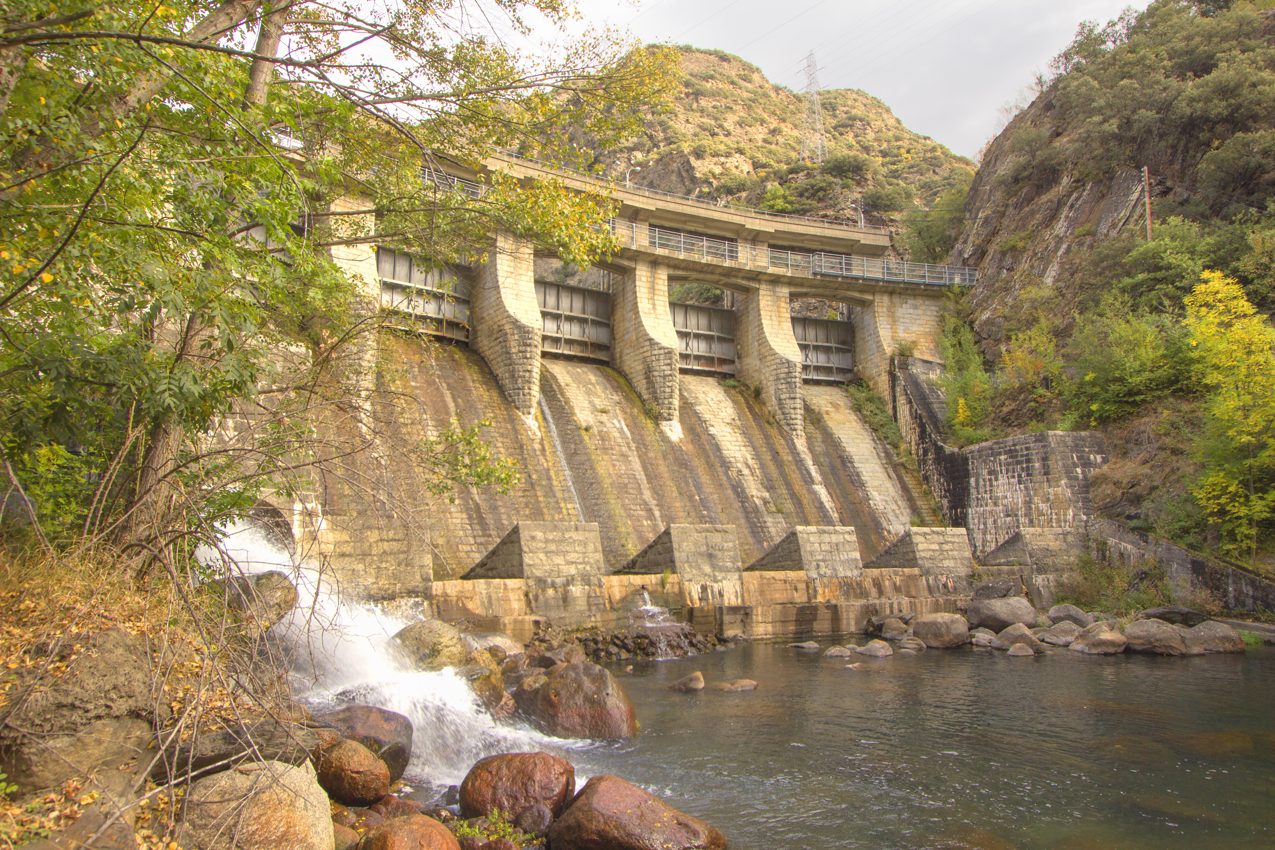 Presa del pantà de la Torrassa, a Espot (Pallars Sobirà)